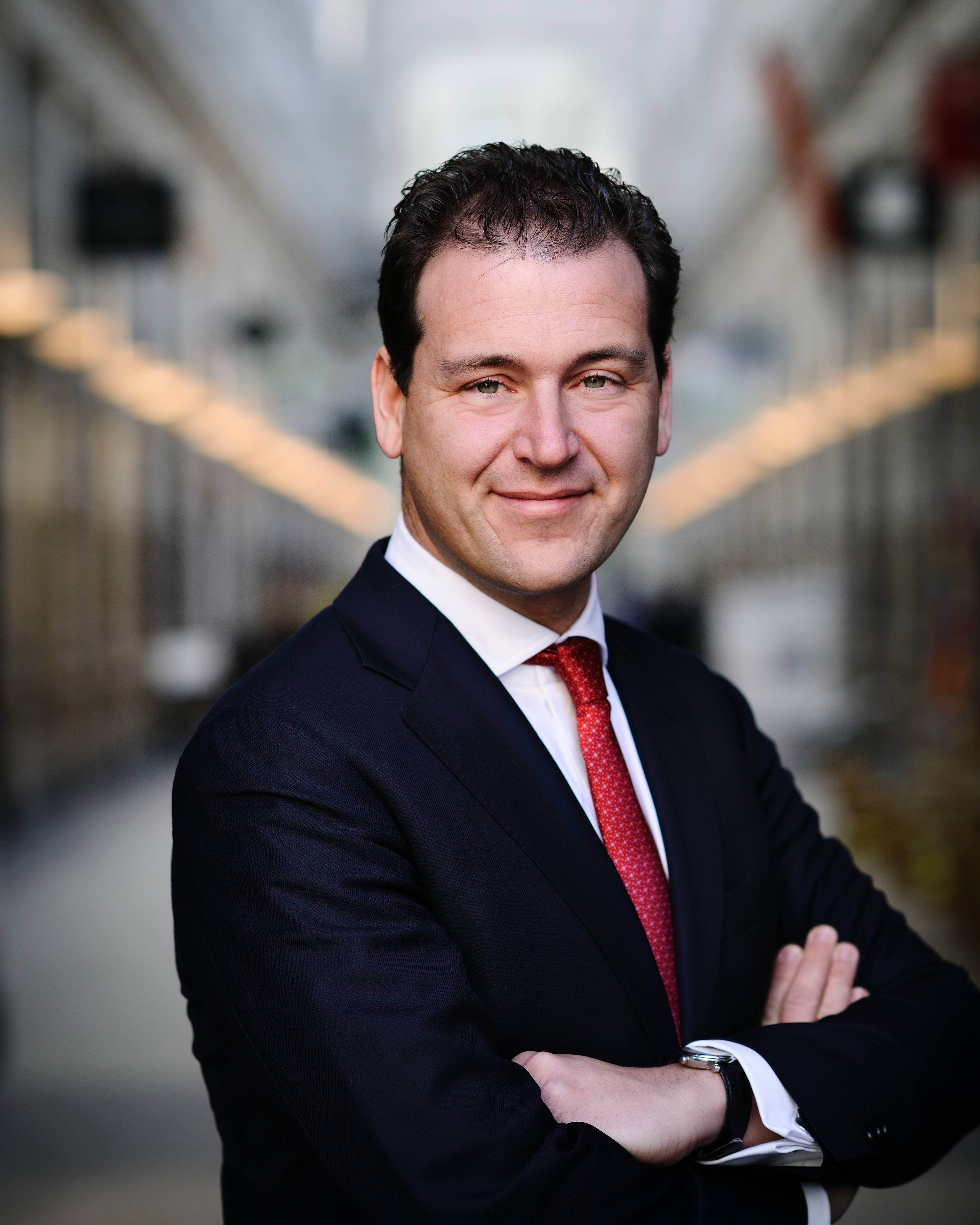 Minister van Sociale Zaken en Werkgelegenheid Lodewijk Asscher